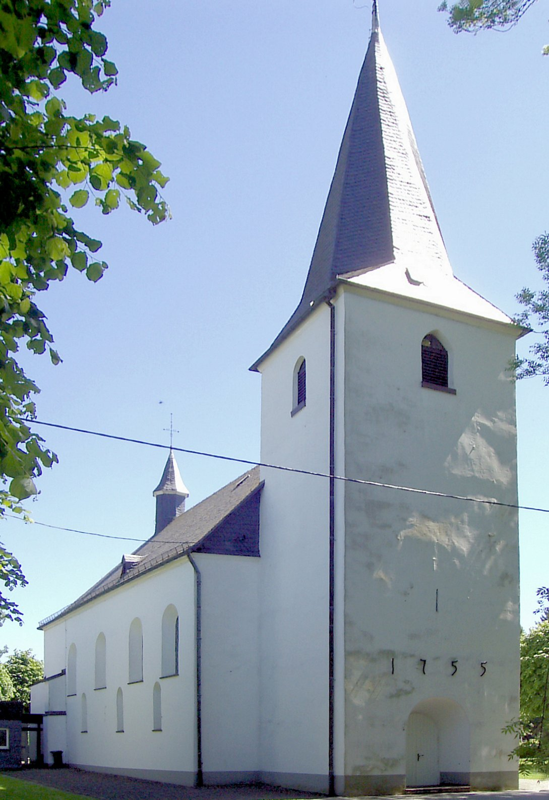 evangelische Kirche in Reichshof-Odenspiel, Oberbergischer Kreis, Nordrhein-Westfalen, Deutschland